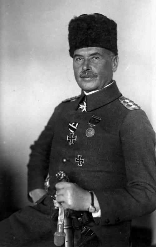 Otto Liman von Sanders soll mit Befehl des Generals Franchet d'Espery vor ein Kriegsgericht gestellt werden. Abgebildete Personen: Liman von Sanders, Otto: General, Oberbefehlshaber der Türkischen Armee, Deutschland (PND 11878000X)